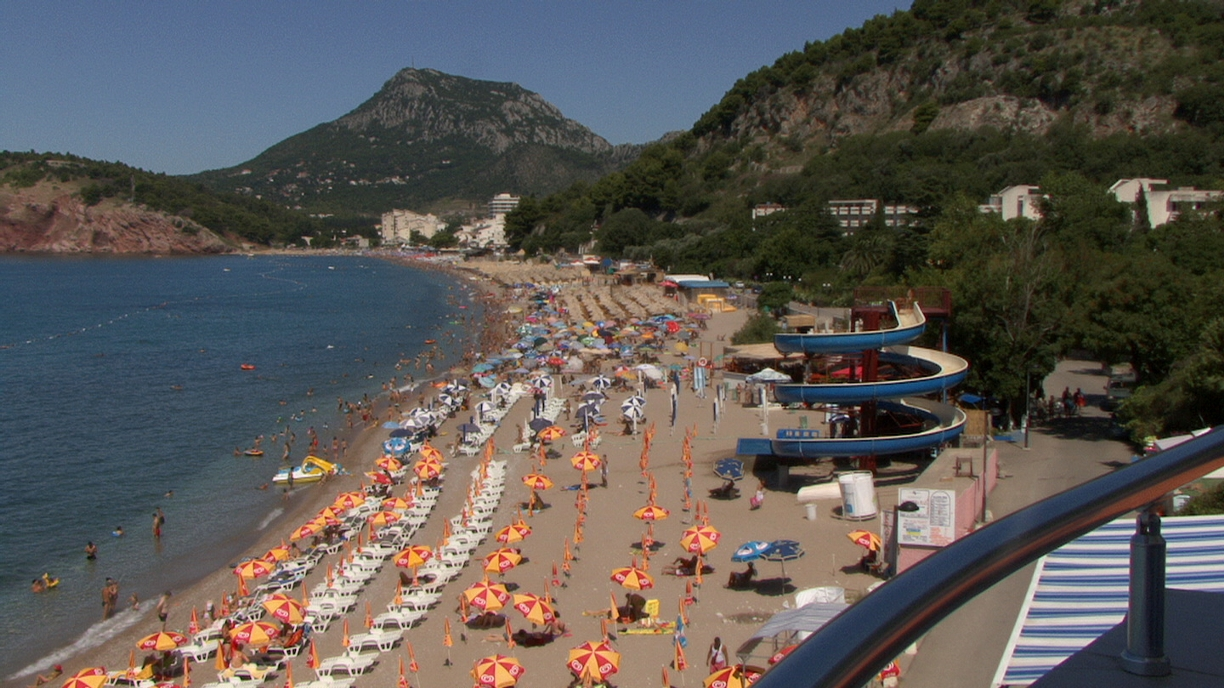 Panorama di Sutomore